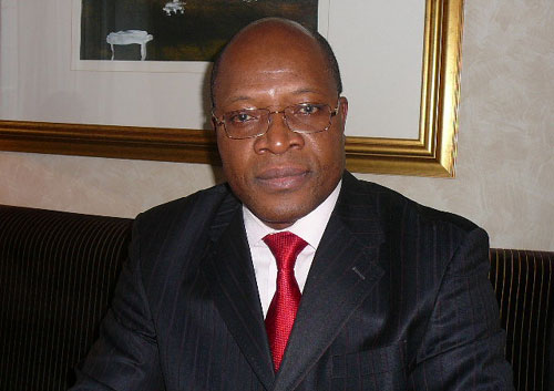 Oscar-Kashala